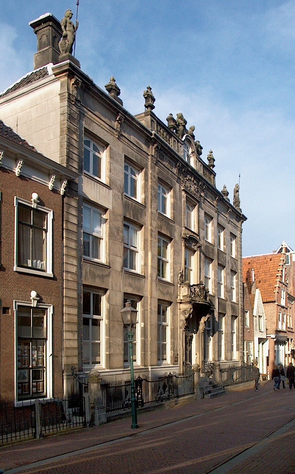 Foreestenhuis; Grote Oost, Hoorn, Nederland.